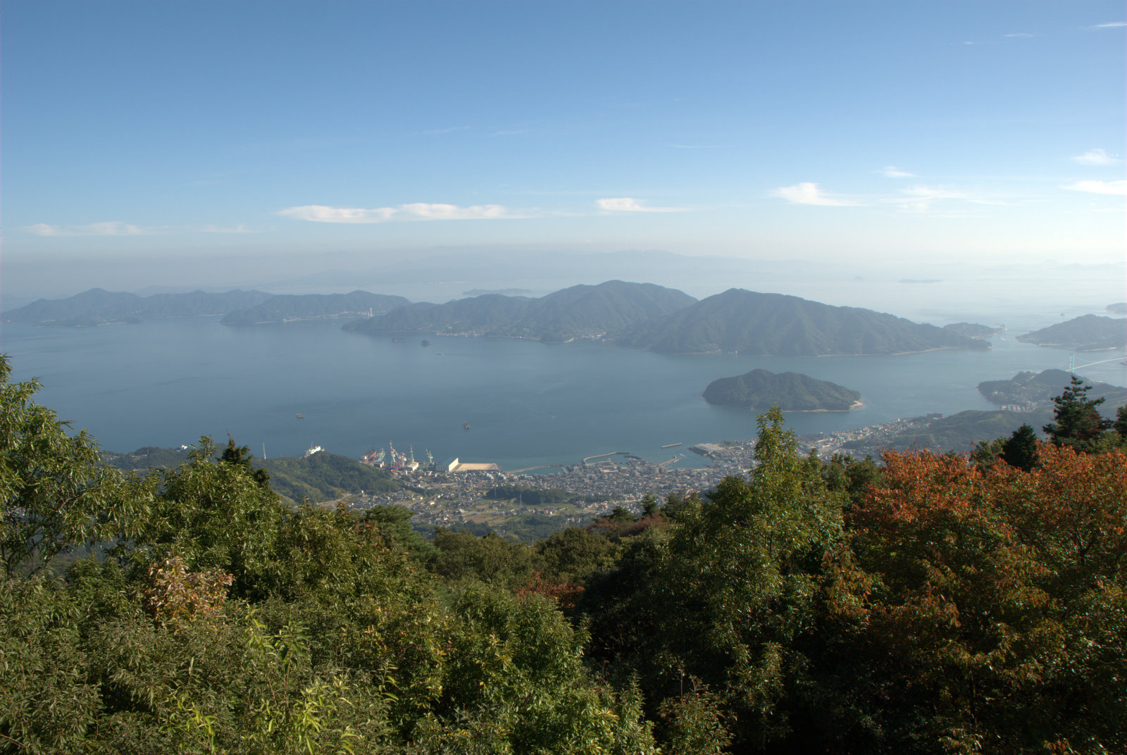 広島県呉市にある野呂山から南南東の眺望